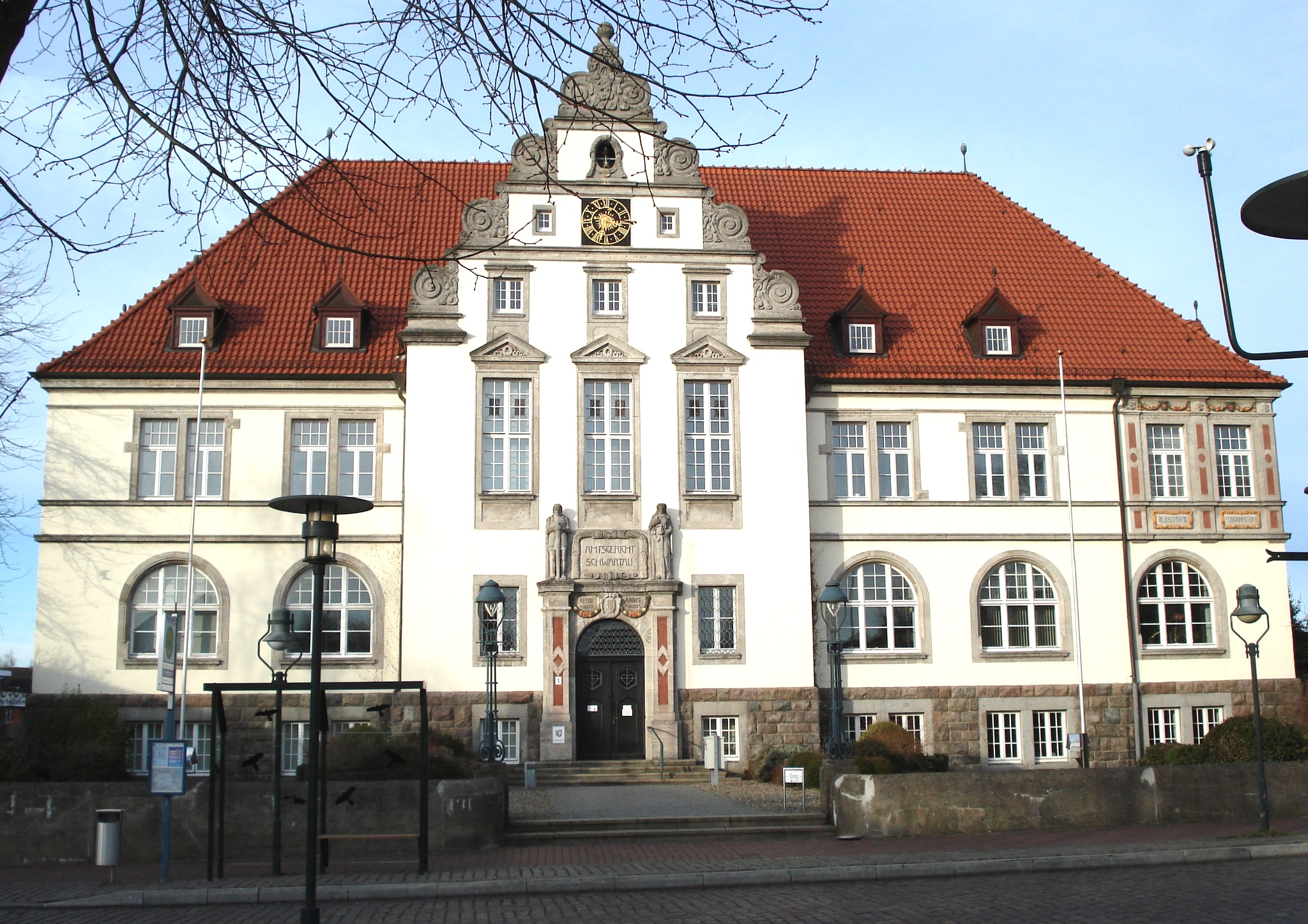 Amtsgericht in Bad Schwartau